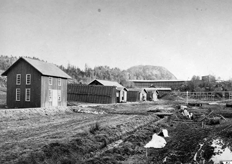 Sprengstoffabrikken på Engene, Sætre, Hurum, Buskerud (1876)